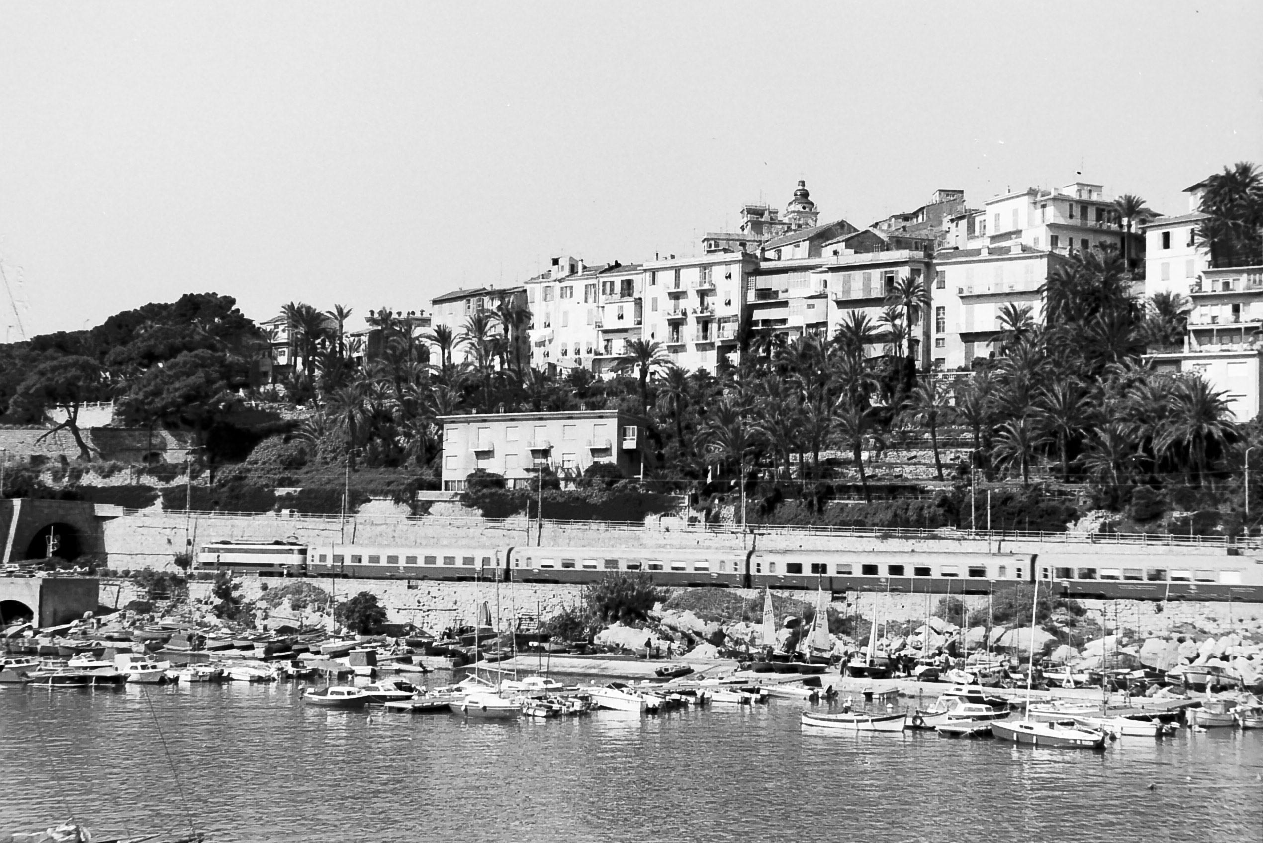 Il treno TEE "Ligure" Milano-Avignone al traino una E 444, ripreso dal porto di Bordighera nel settembre 1975.